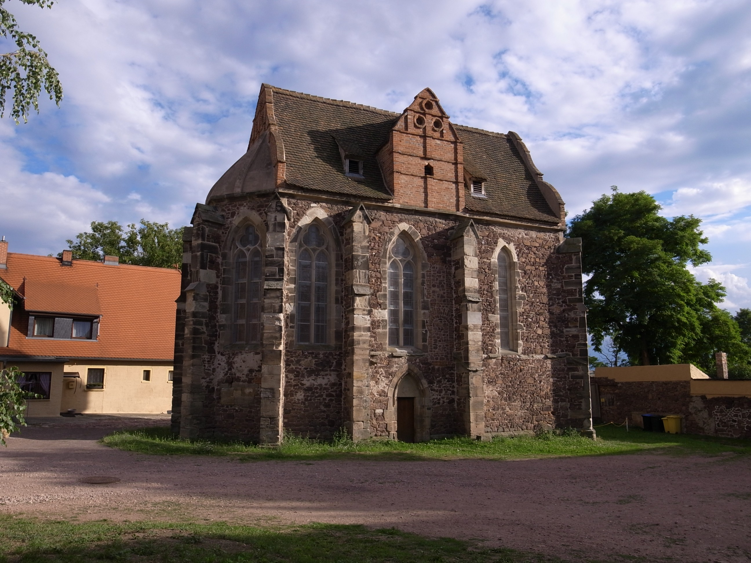 Templerkapelle in Mücheln